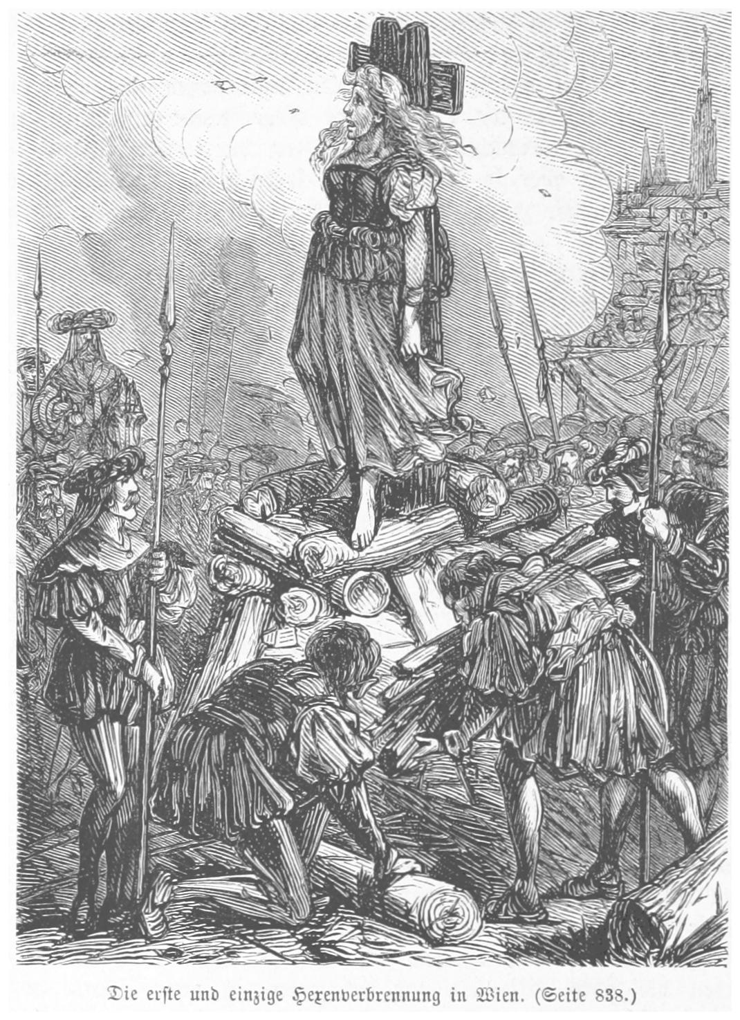 Am 27. September 1583 wurde die greise Frau Elisabeth Pleinacher nach mehrfacher Folterung (Delikt: Buhlschaft mit dem Teufel und Schadzauber) verurteilt und auf dem Richtplatz auf der Gänsweid als erste und einzige Wienerin wegen Hexerei auf dem Scheiterhaufen öffentlich verbrannt.